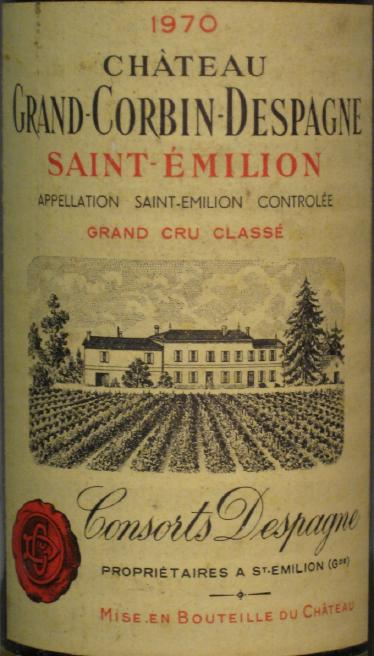 Château Grand Corbin-Despagne 1970 label